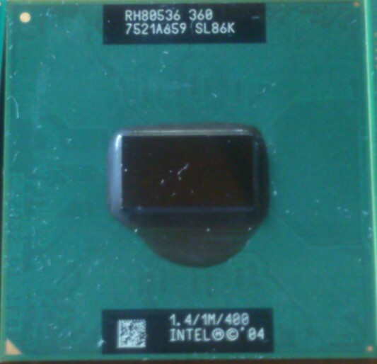 DothanのCeleronM